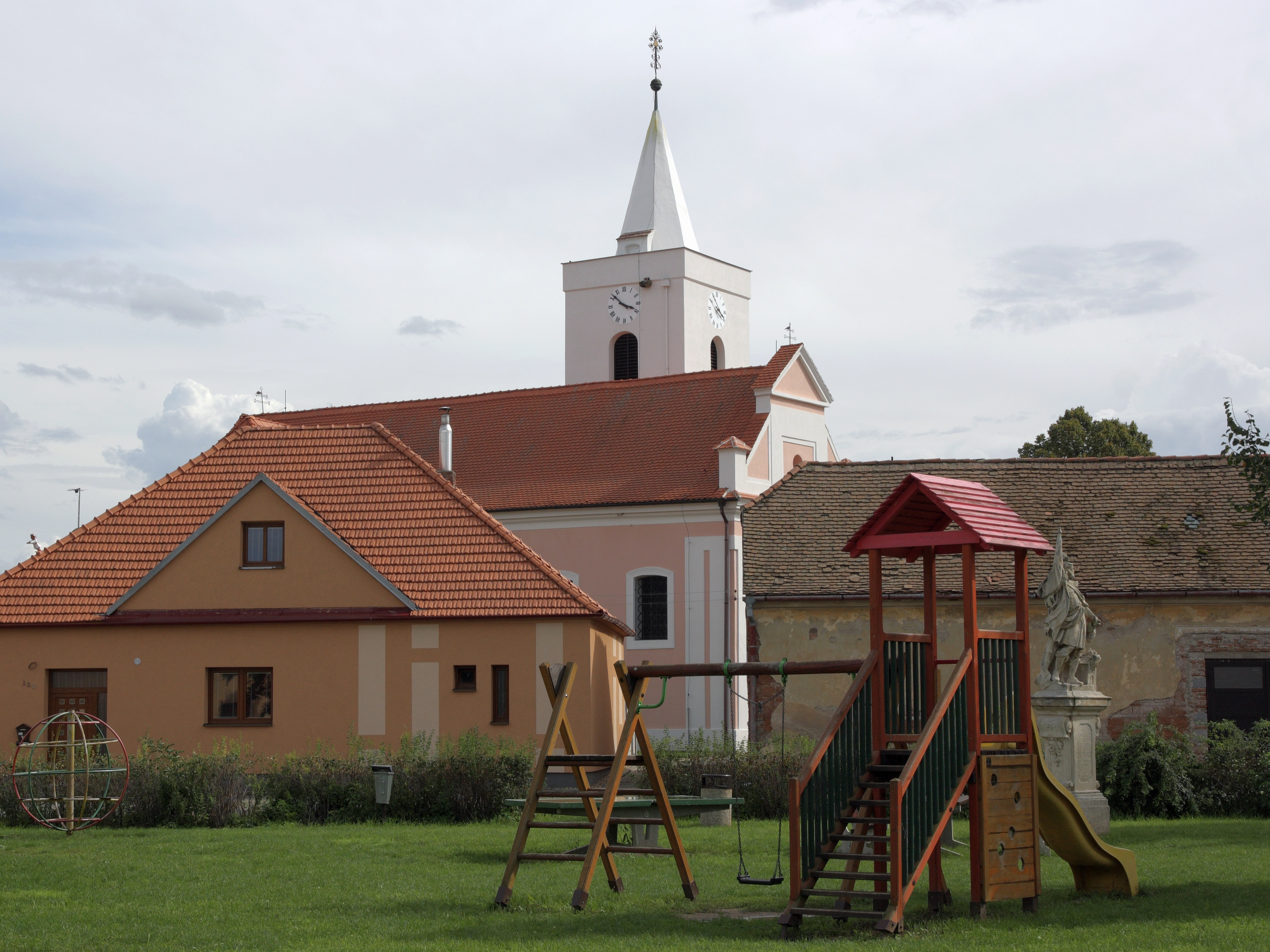 Malešovice - náves.